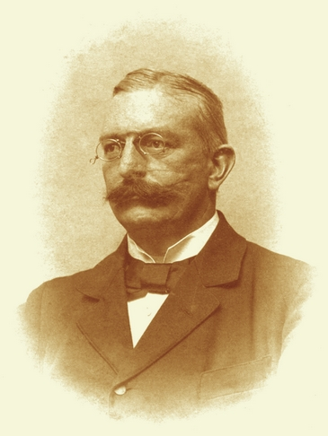 Großherzoglich Sächsischer Geheimrat Dr. jur. Alfred Appelius, 1905, nachmaliger Präsident des Landtages im Großherzogtum Sachsen (-Weimar-Eisenach)